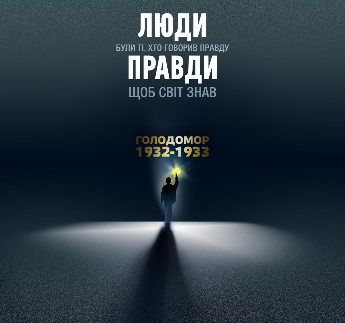 Люди Правди. Серія плакатів про тих, хто, ризикуючи кар'єрою, свободою або навіть життям, зробили все, щоб зберегти та поширити правдиві відомості про Голодомор. Щоб світ знав.